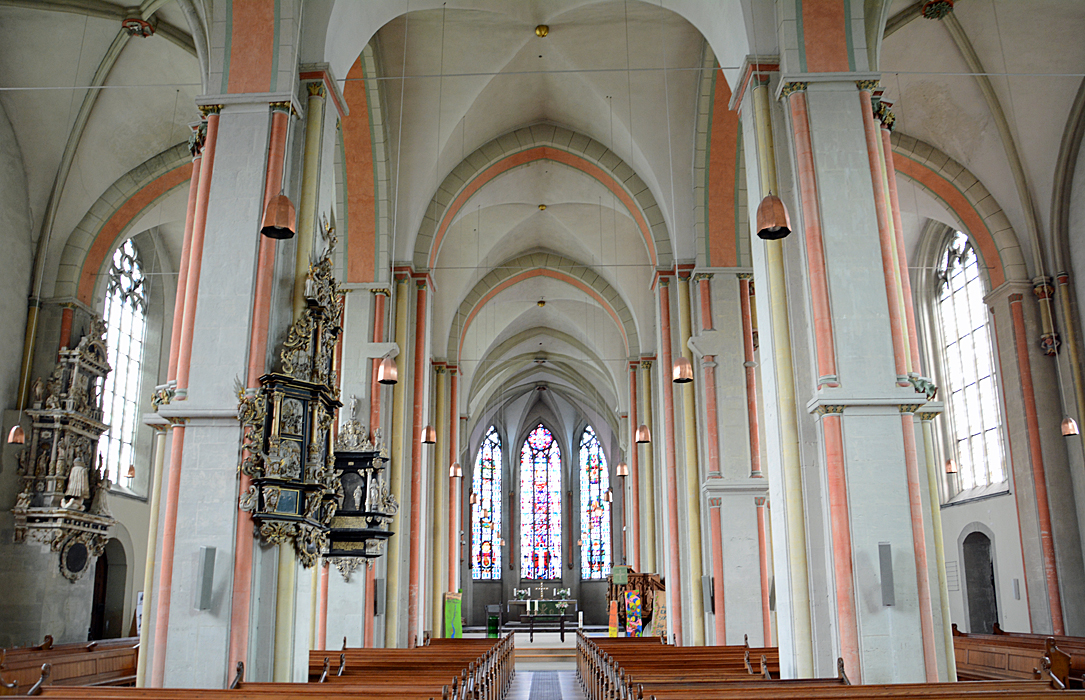 Inneres der Katharinenkirche in Braunschweig